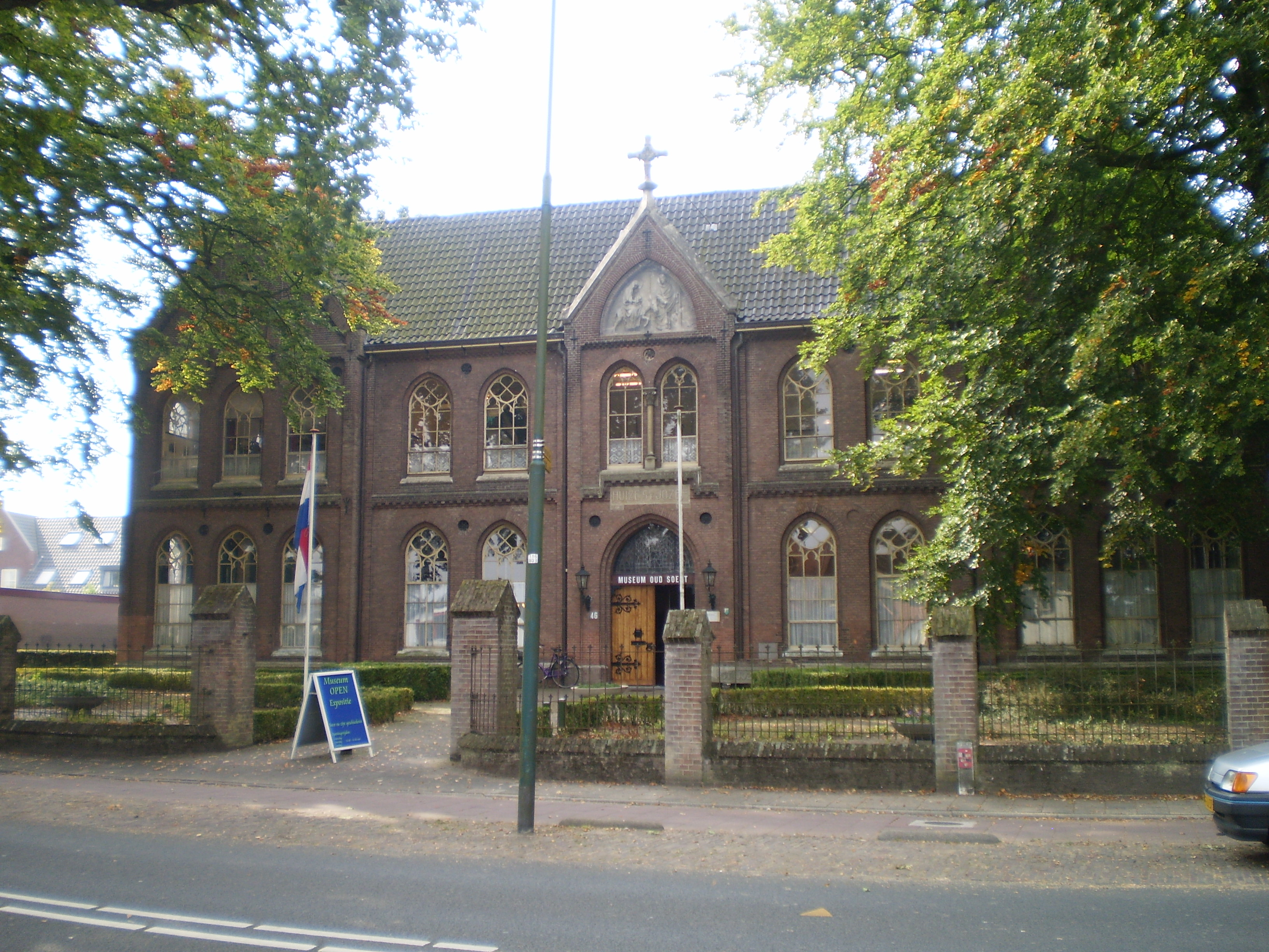 Oanbean troch Swarte Kees op 27 septimber 2009